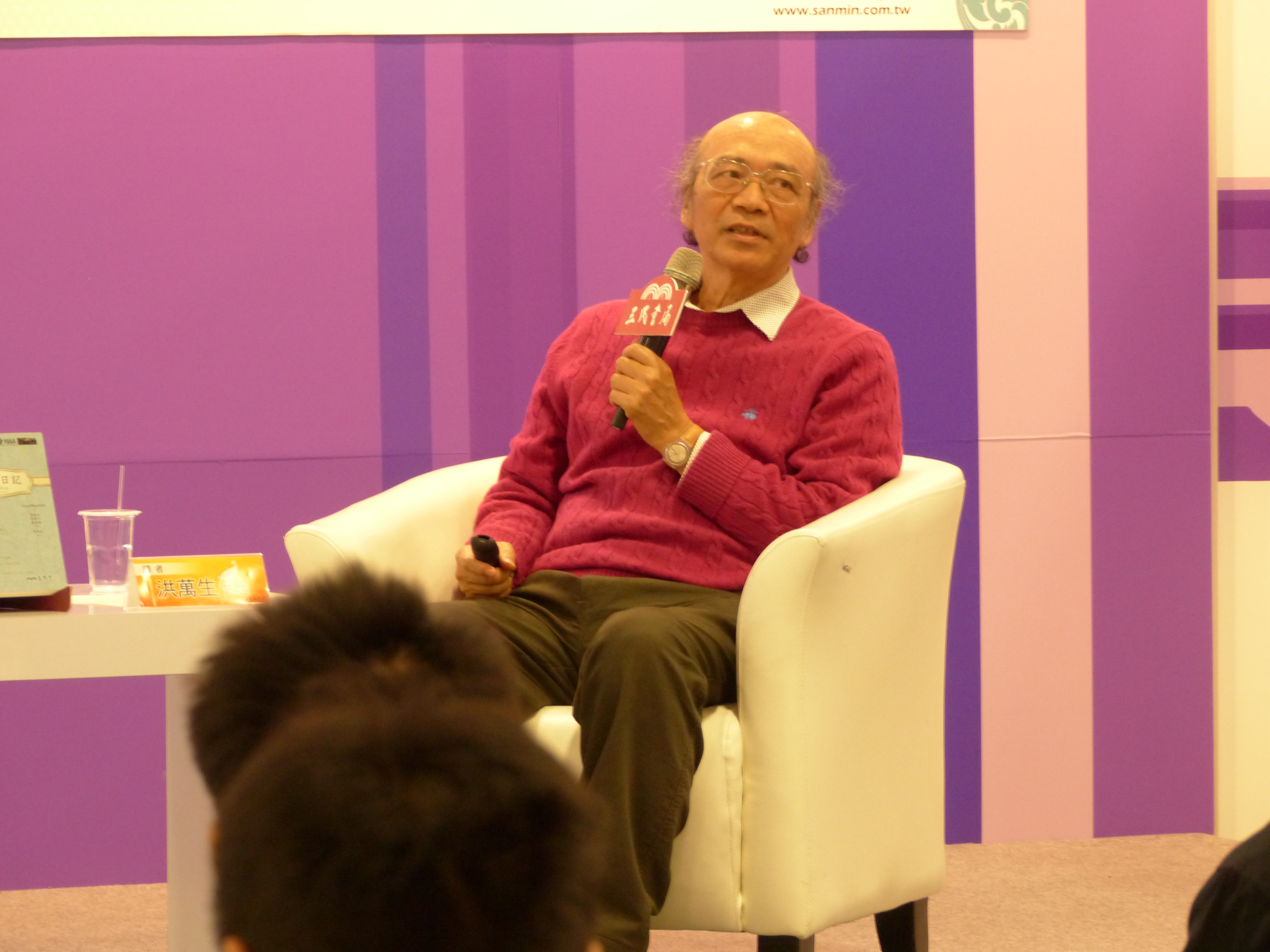 第22屆臺北國際書展，出席世貿一館三民書局數學小說《蘇菲的日記》新書發表會的譯者：國立臺灣師範大學數學系退休教授洪萬生。